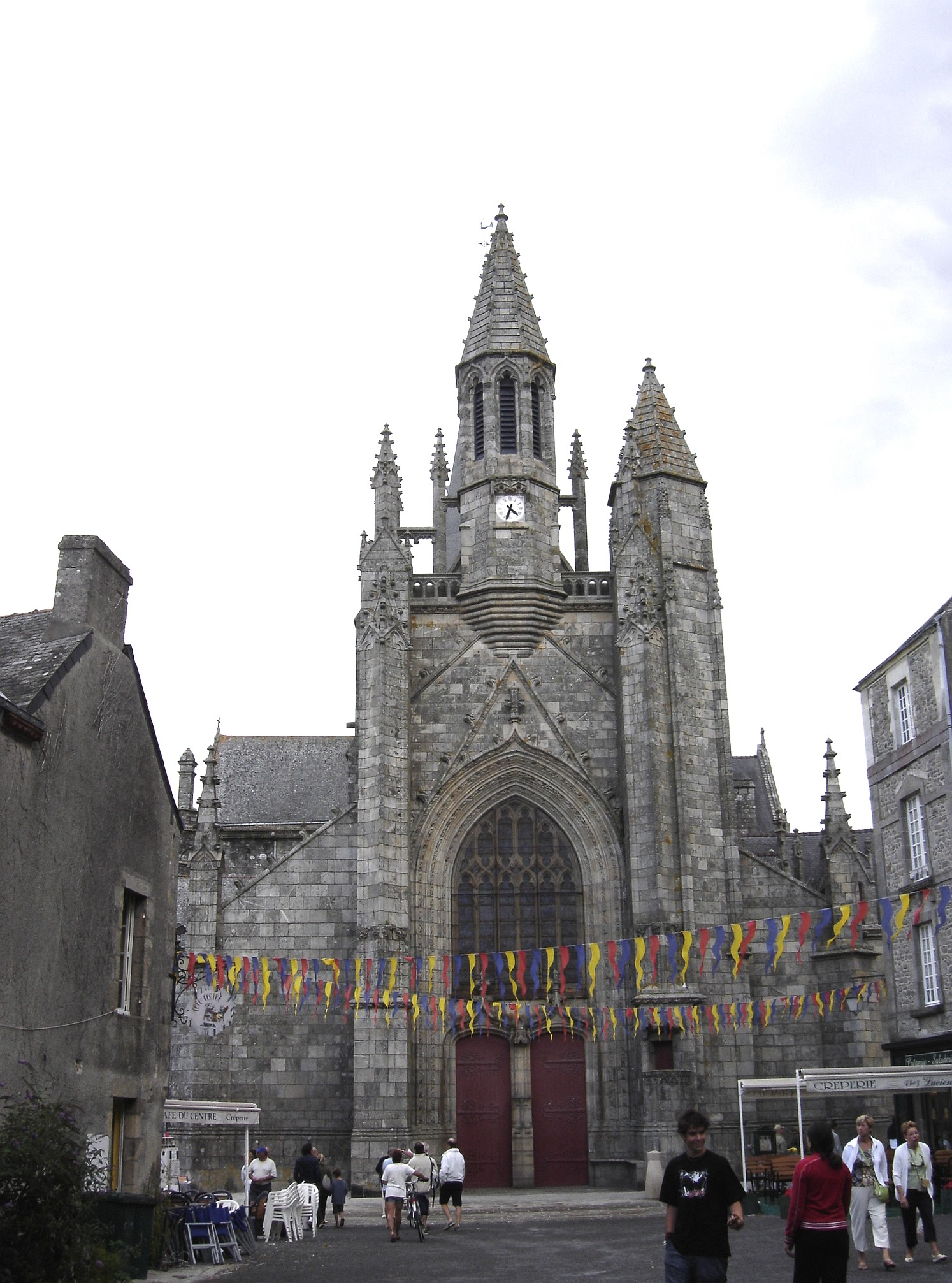 Collégiale Saint-Aubin de Guérande (Bretagne, France)